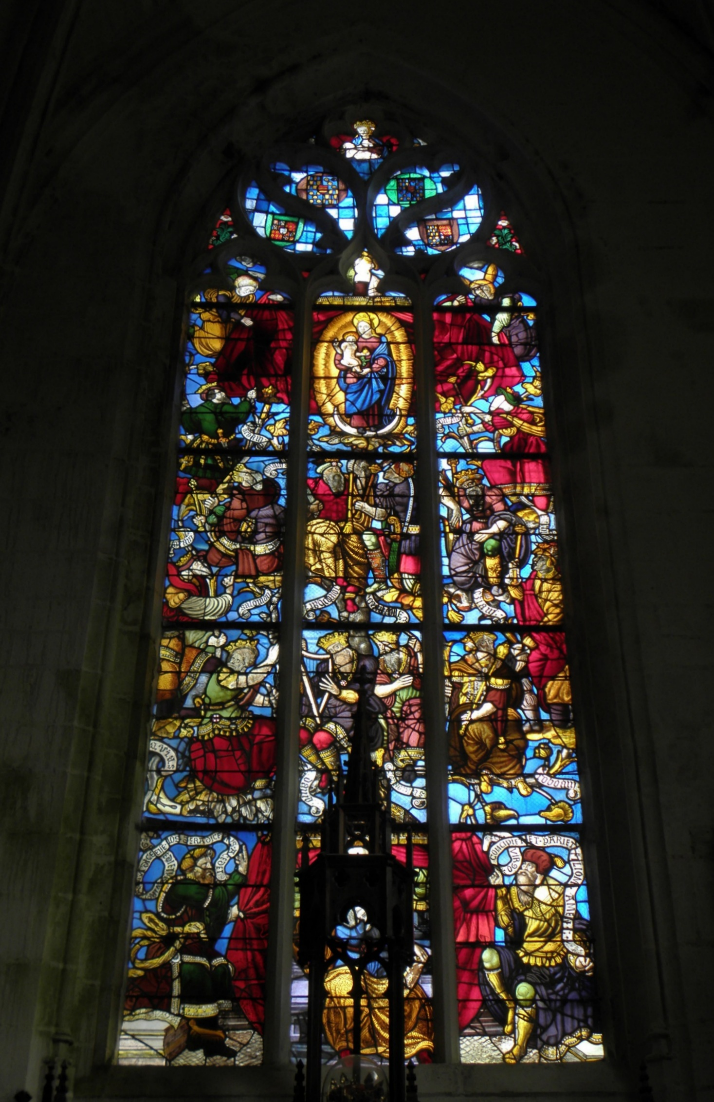 Vitrail de l'arbre de Jessé sis transept sud de la chapelle N.D. de Quelven, commune de Guern (56).